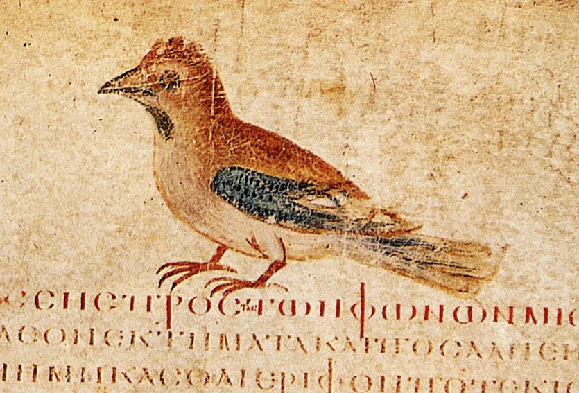 Ein Eichelhäher aus der Paraphrase der Ornithiaka des Dionysios im Wiener Dioskurides fol. 475 verso. Die Ornithiaka des Dionysios ist ein verschollenes Lehrgedicht über Vögel, von dem im Dioskurides-Manuskript eine (unvollständige) Bearbeitung in Prosa existiert.